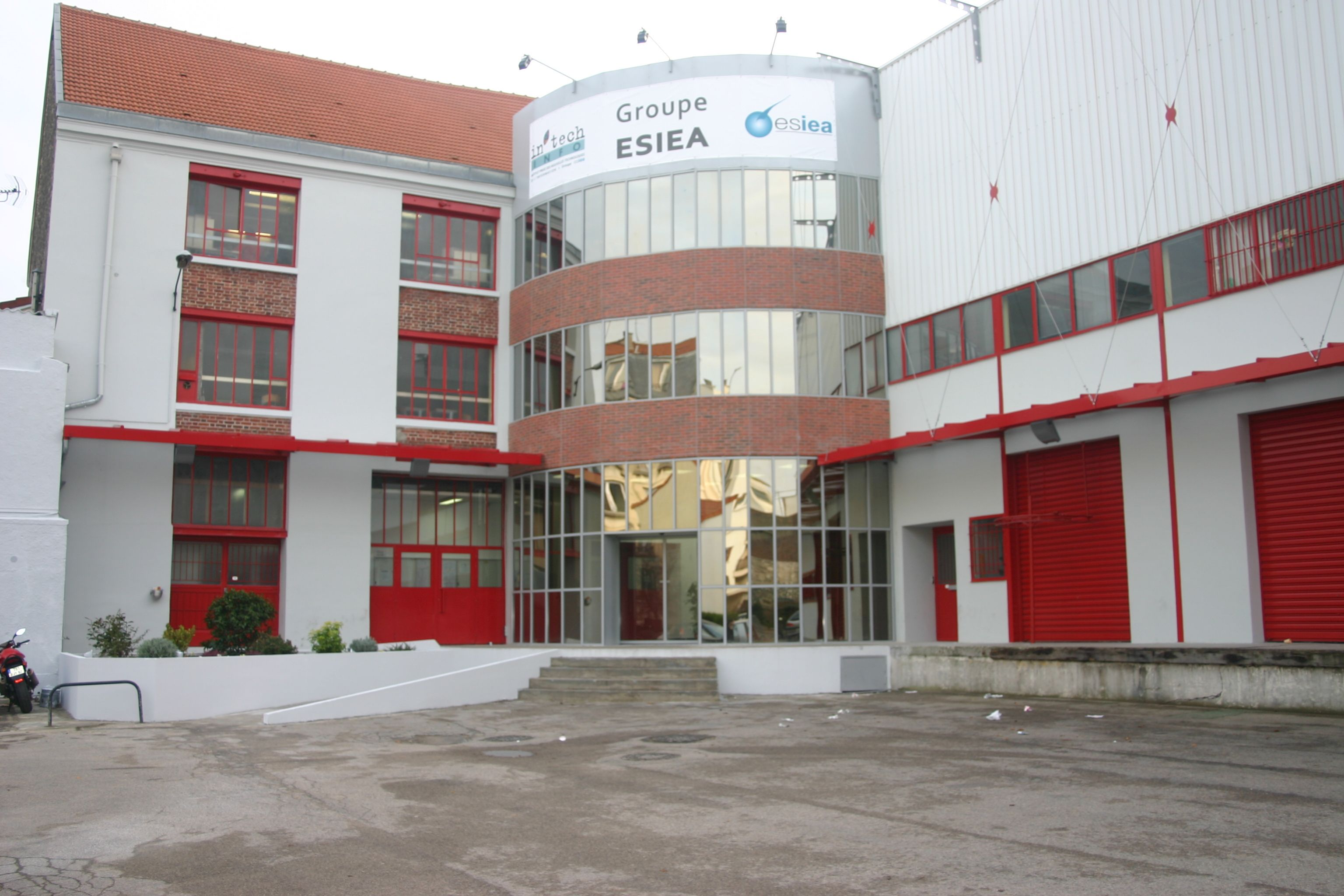 Entrée de l'école ESIEA ; École supérieure d'informatique électronique automatique